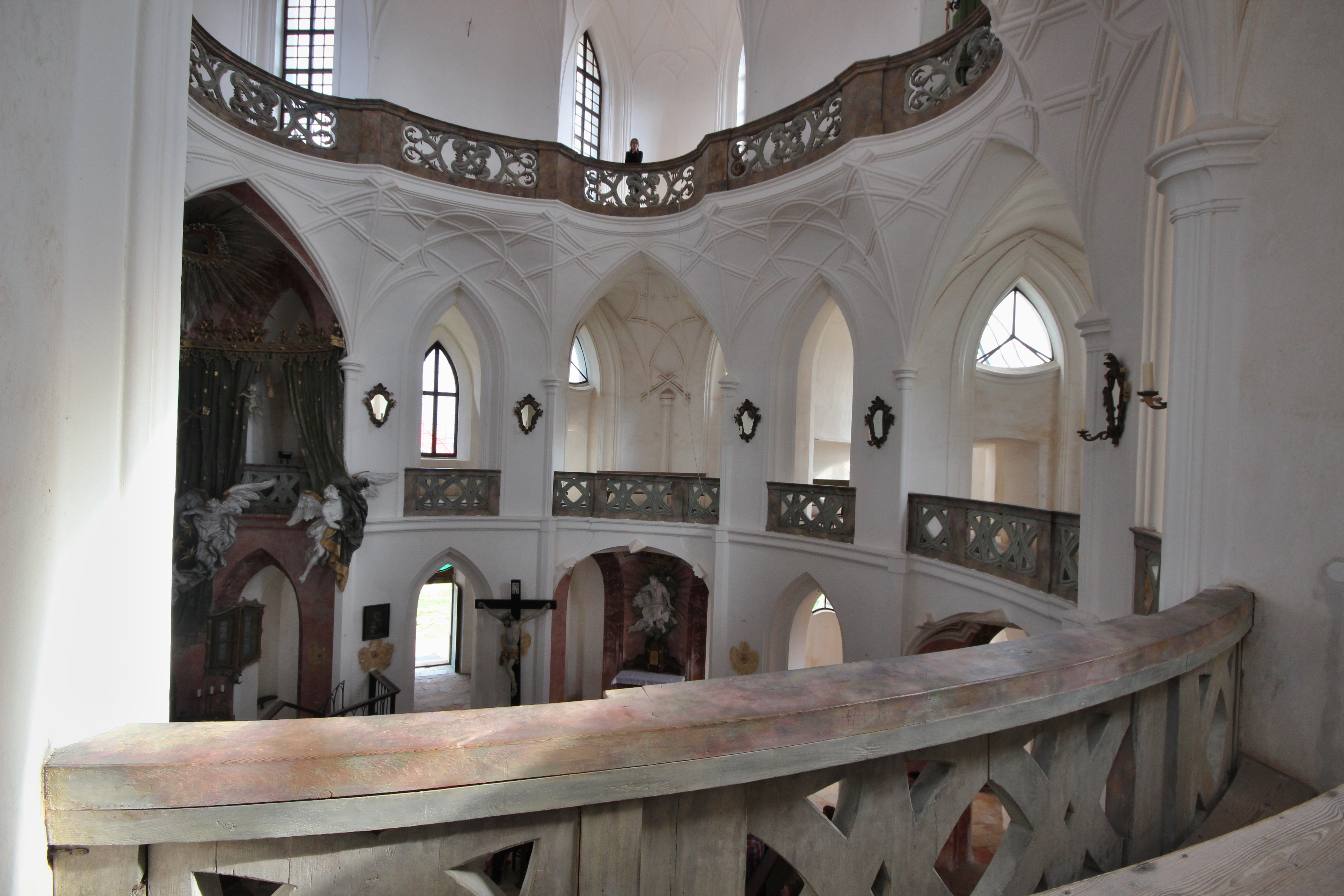 Poutní kostel sv. Jana Nepomuckého na Zelené hoře.